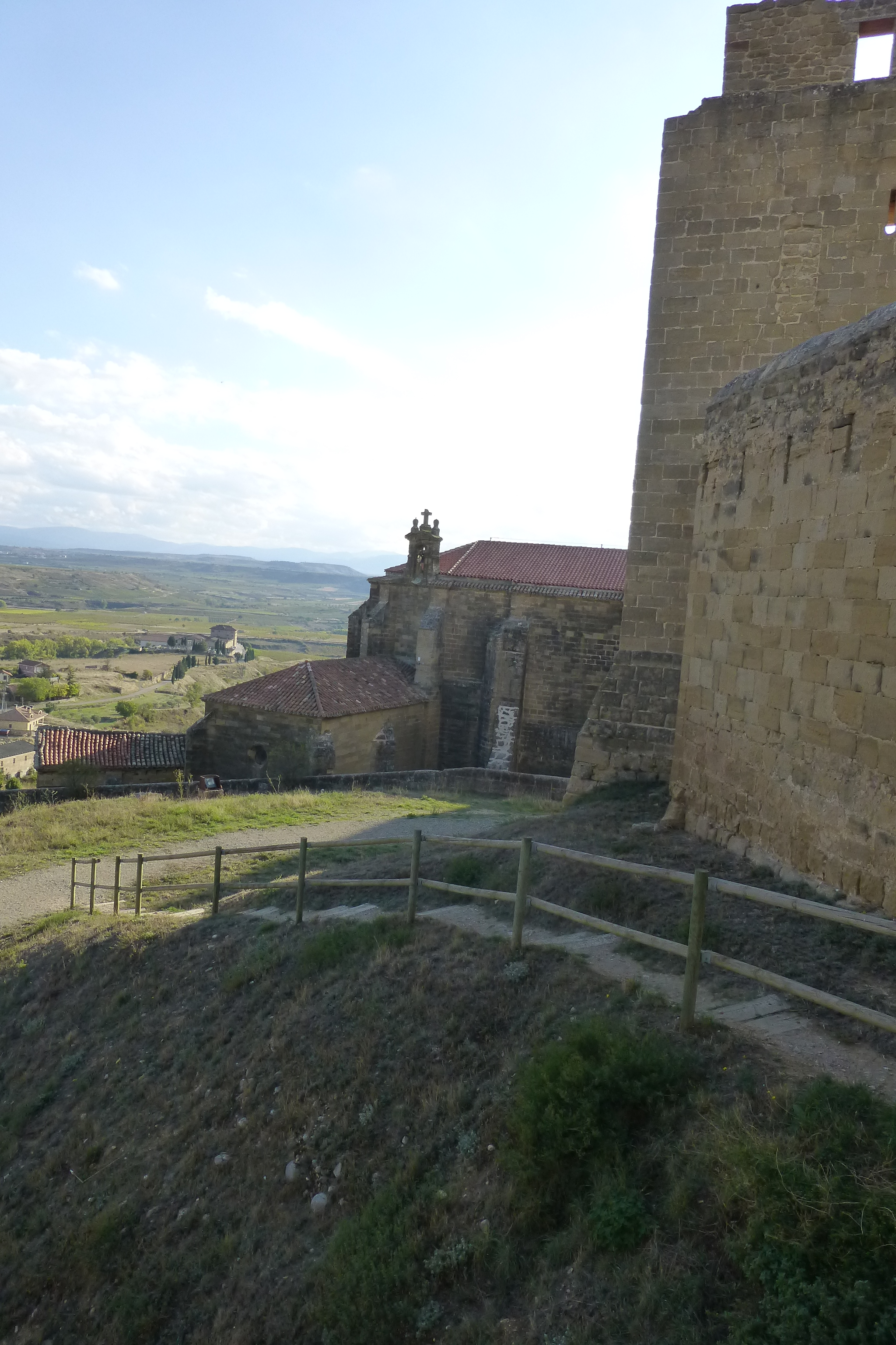 Detalle y vista parcial del recinto amurallado de San Vicente de la Sonsierra, La Rioja España. Se parte del castillo y la ermita de san Juan de Arriba.